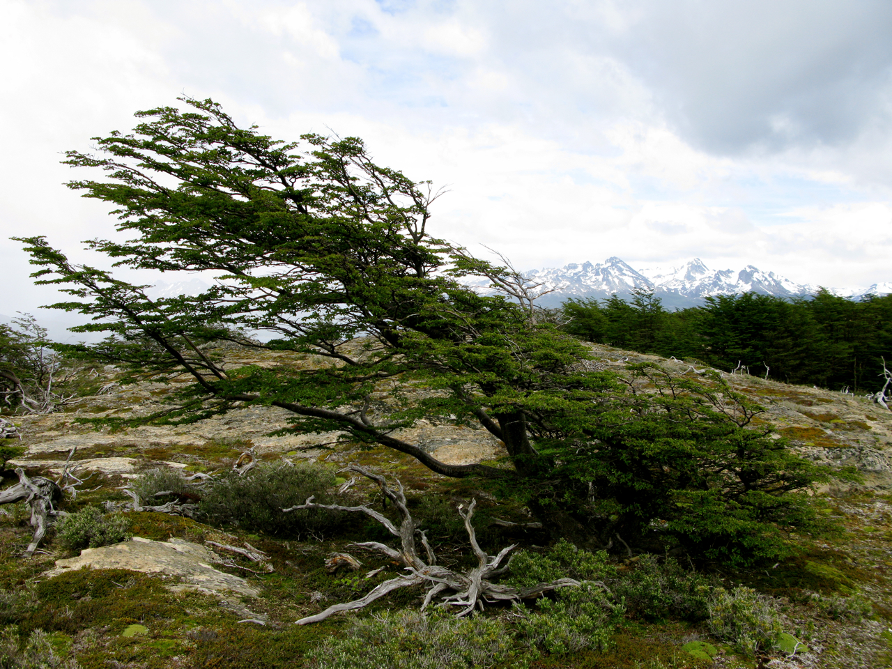 Action du vent / arbre Tierra del Fuego